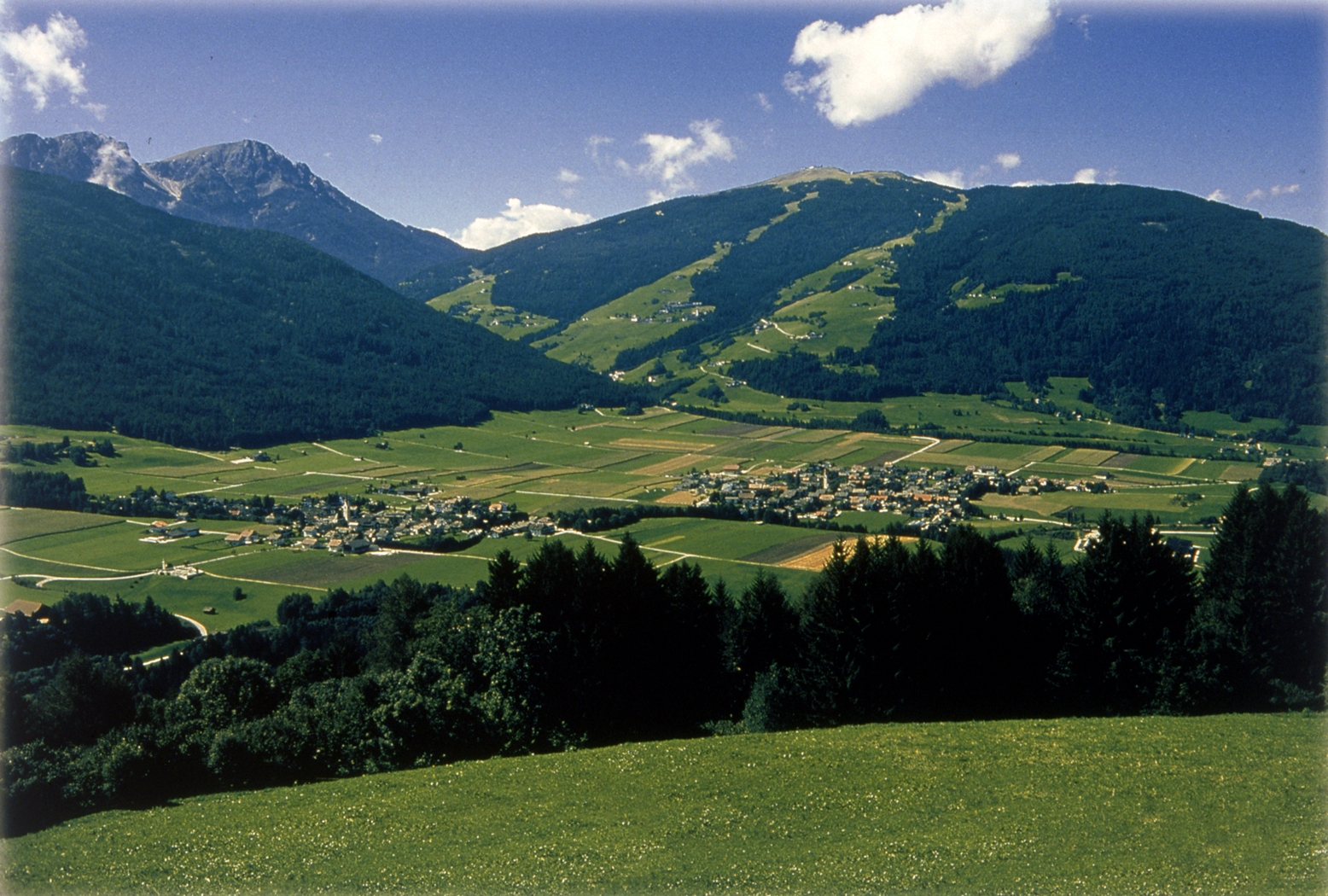 Olang, Valdaora, Pustertal, Kronplatz, Plan de Corones